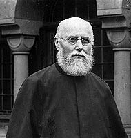 Pater Amandus Acker (+1923), Spiritaner, Missionspionier